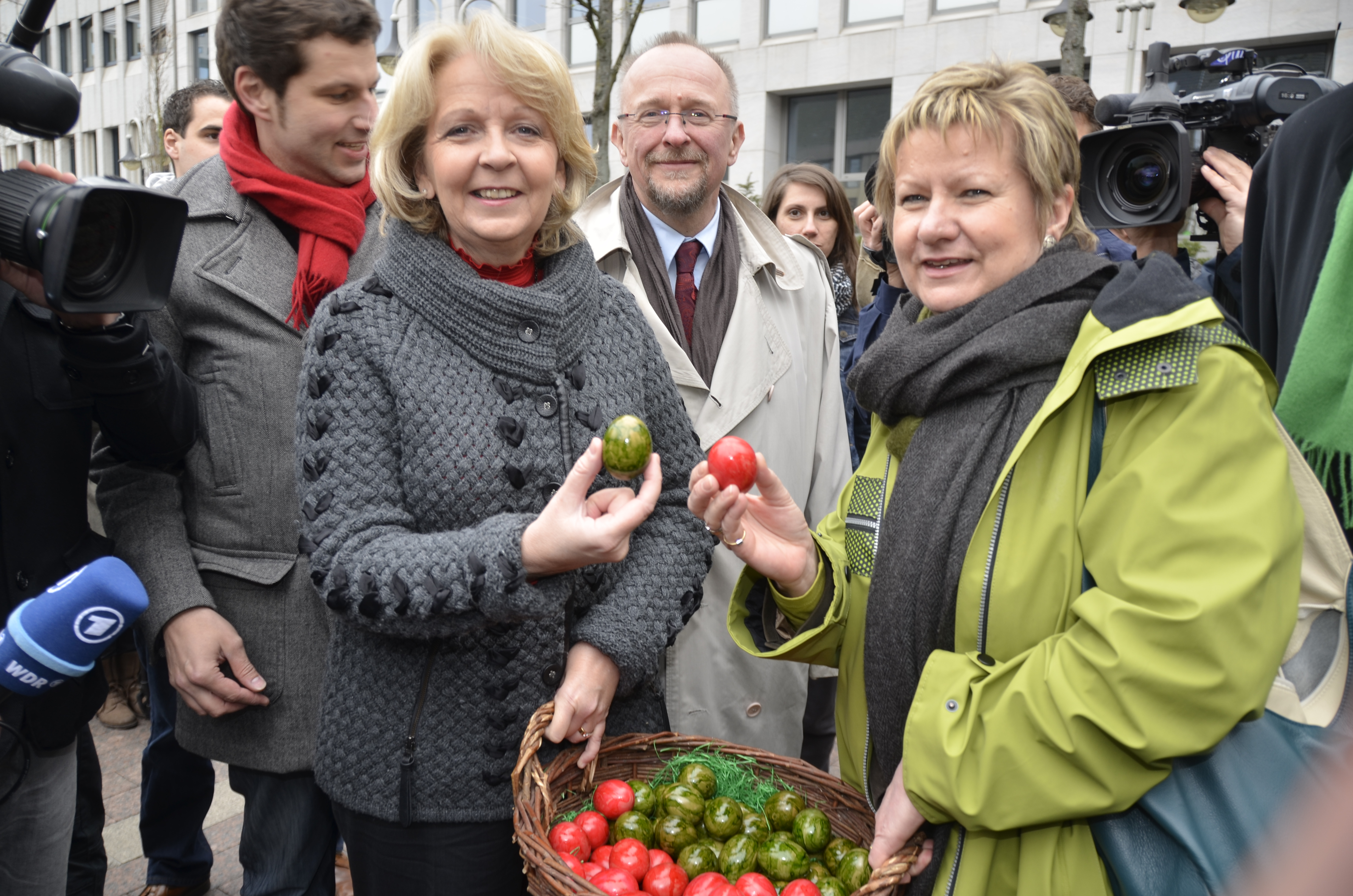 2012-04-05 Osteraktion Bochum